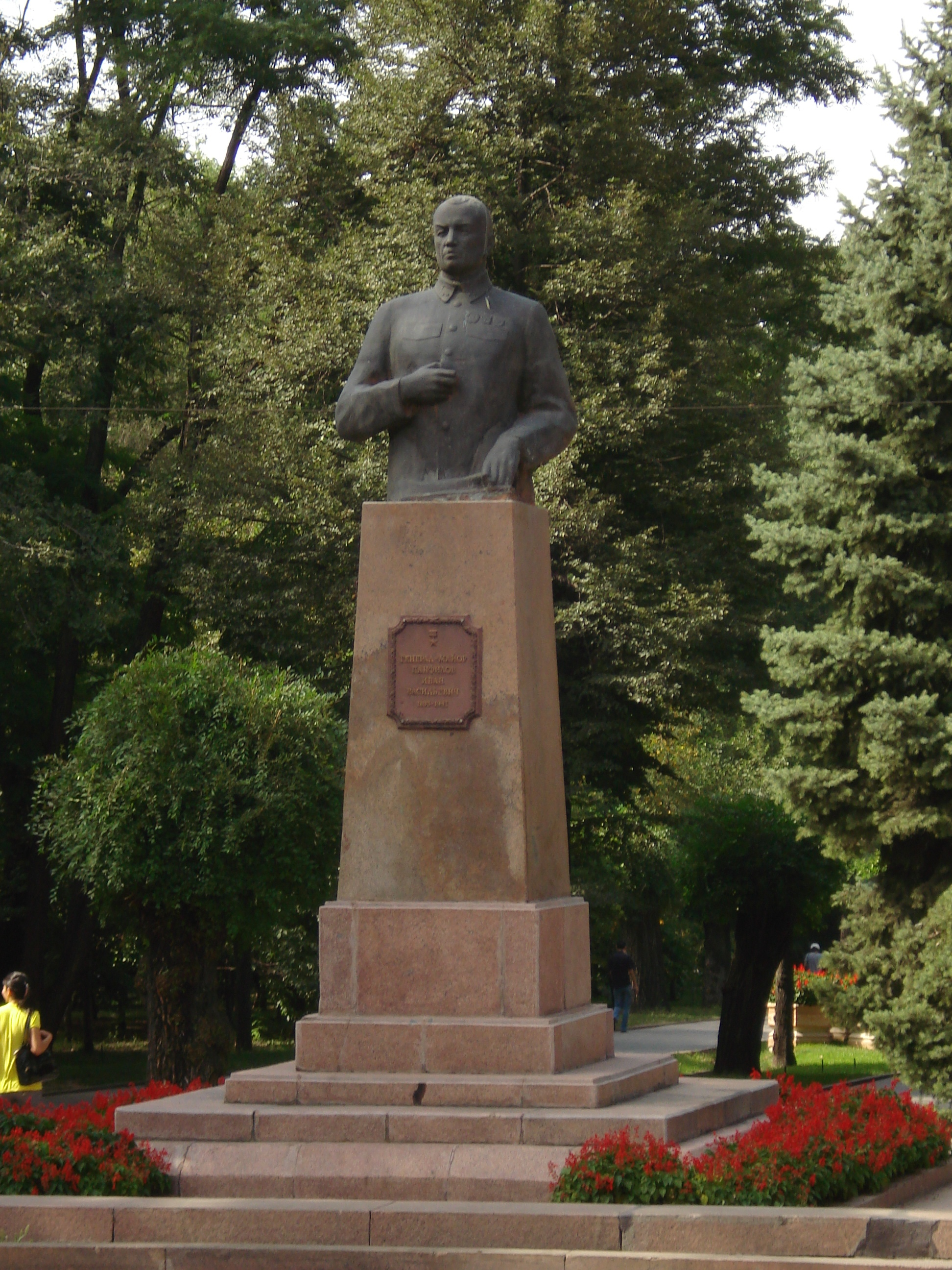 Памятник И. В. Панфилову в городе Алматы